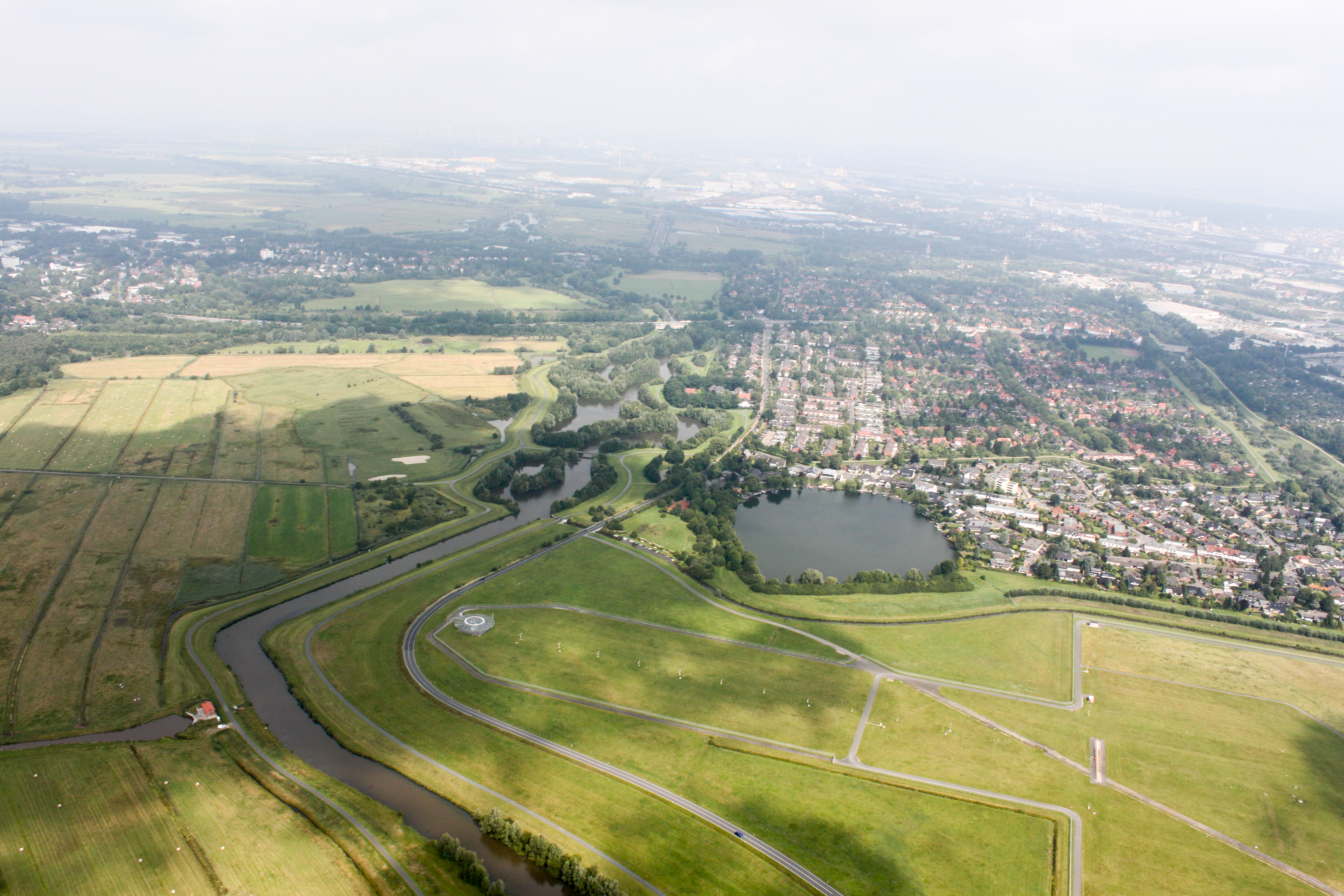 Fotoflug: von Flughafen Ganderkesee - Ganderkesee Stadt - Hasportsee - Roland Center - Grollaner See - Airport Bremen (identische Bildbeschreibung für File:2012-08-08-fotoflug-bremen zweiter flug 0001.JPG bis File:2012-08-08-fotoflug-bremen zweiter flug 0100.JPG